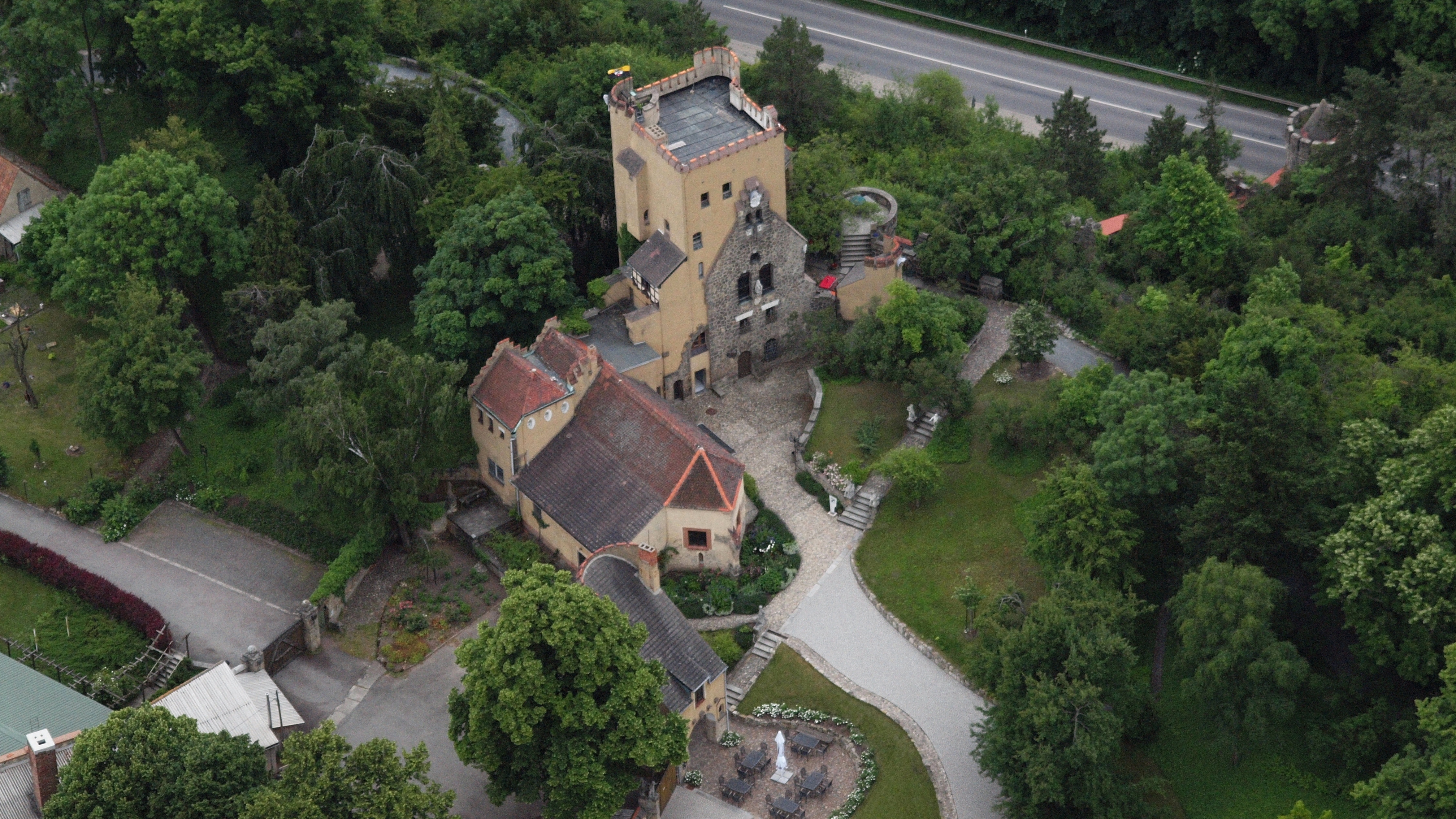 Roseburg, Ballenstedt: Luftaufnahme aus nordwestlicher Richtung